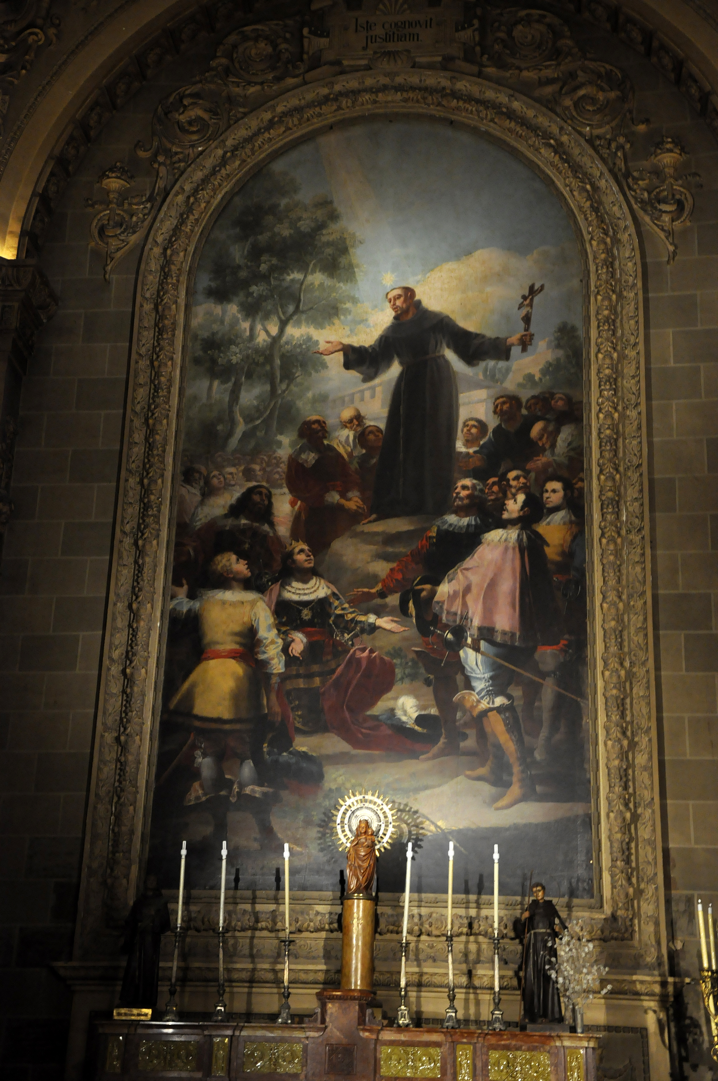 La obra muestra a San Bernardino de Siena predicando ante el rey Alfonso V de Aragón. El hombre joven que aparece a la derecha de la obra está considerado un autorretrato del pintor Francisco de Goya.